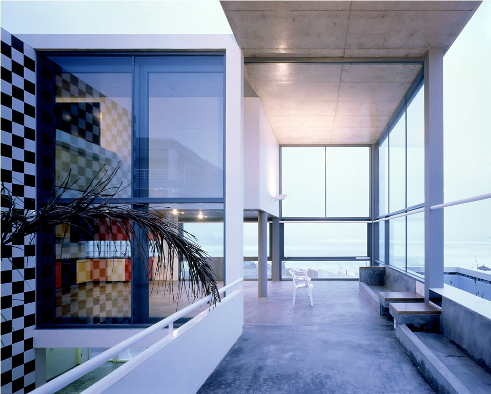 Ciriani's beach house near Lima, Peru